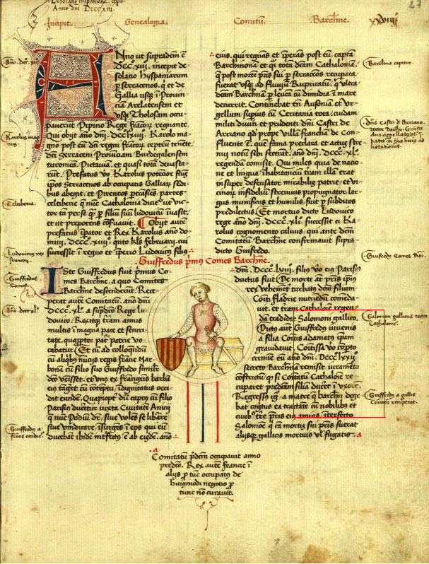 Genealogies dels comtes de Barcelona; continuades per l'arxiver Jaume Garcia i per Pere Miquel Carbonell. Manuscrit 246